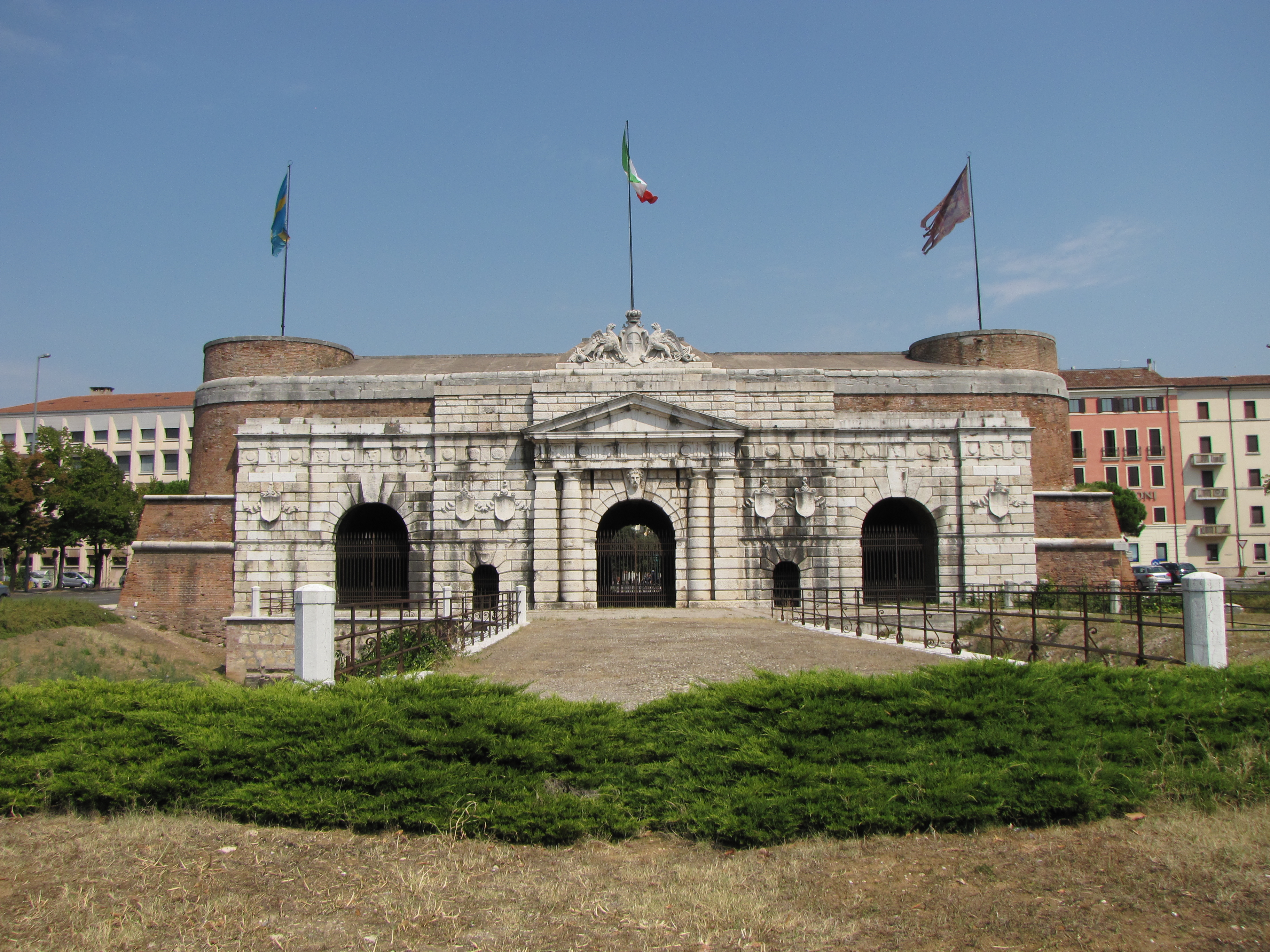 Porta Nuova, l'accesso a Verona da sud